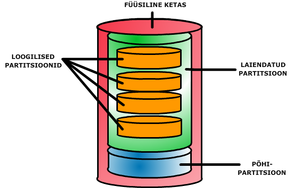 Ketta partitsioonide tüübid